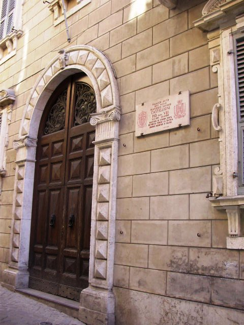 Palazzo Castiglioni. Lapide a Pio VIII